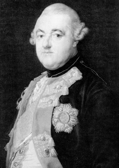 Karl Theodor Keurvorst van de Palts (1724-1799) voorstellend, met Huisridderorde van Sint-Hubertus